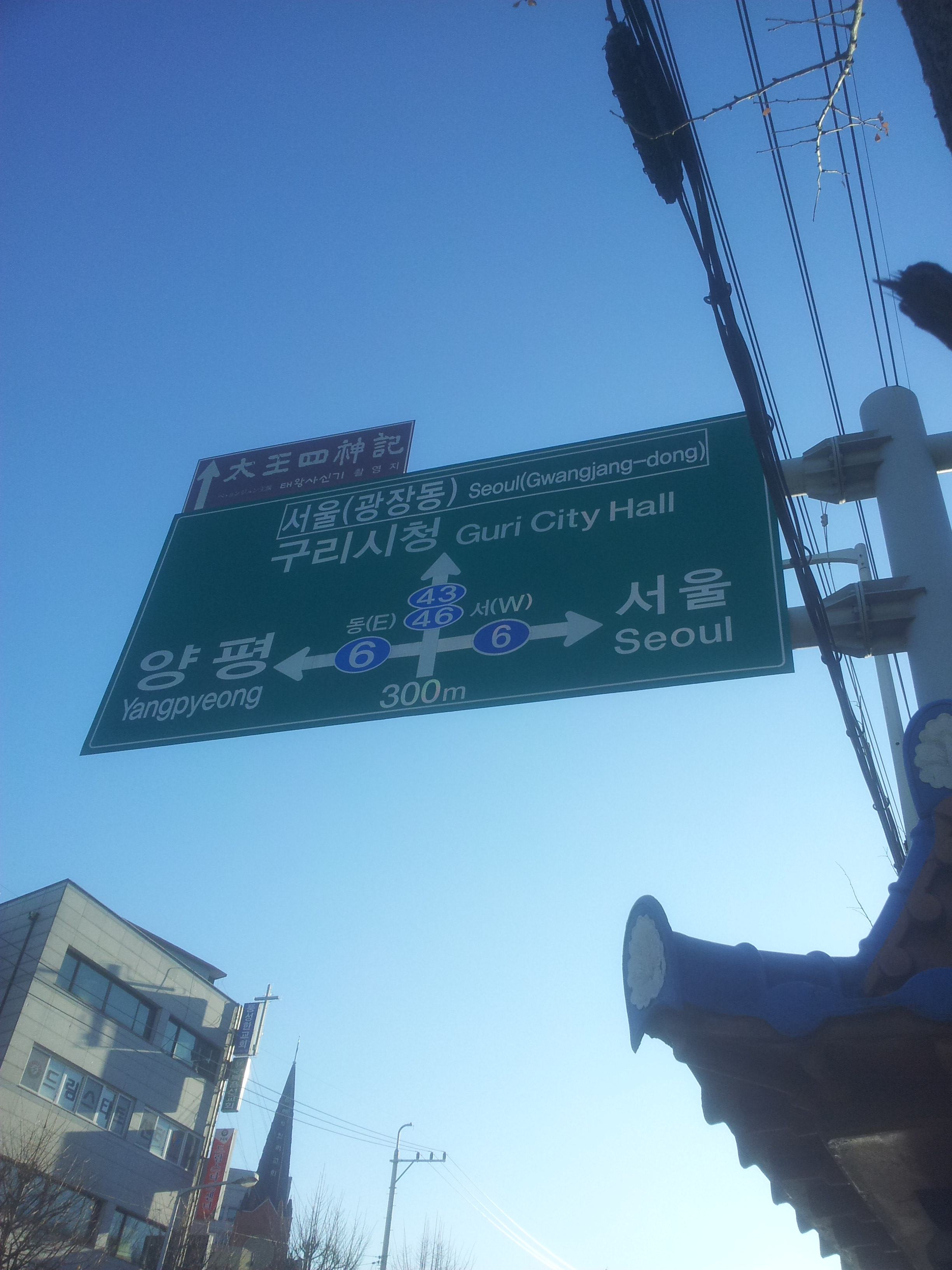 Seoul Two way.